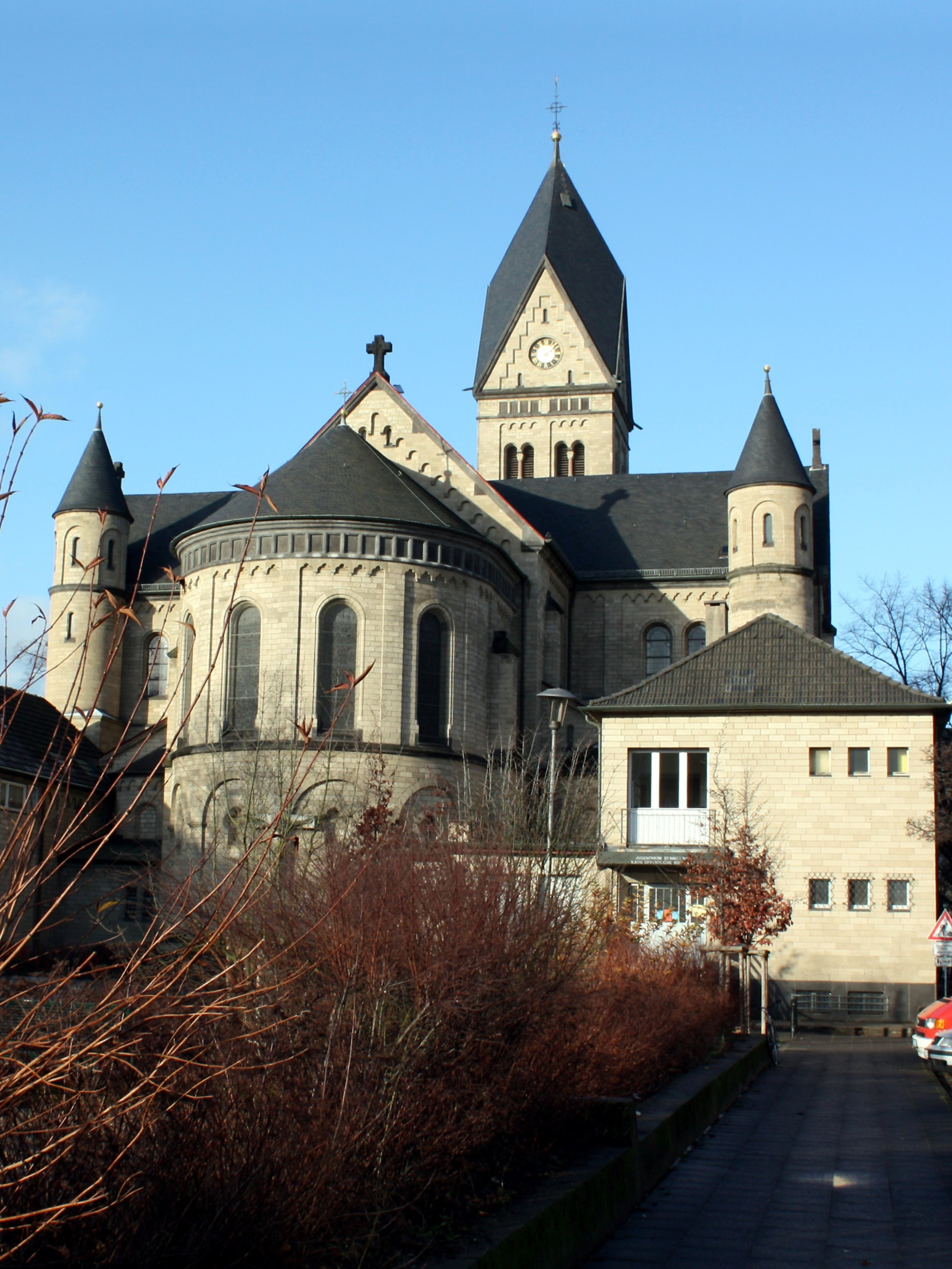 St. Nikolaus , Köln-Sülz. Südseite